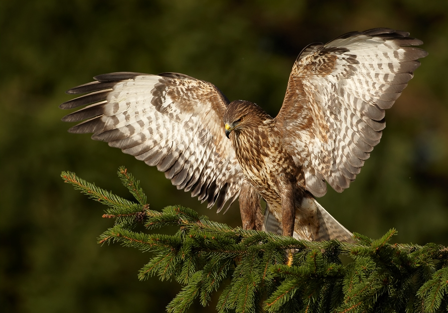 Buteo buteo, Žďárské vrchy, CZ